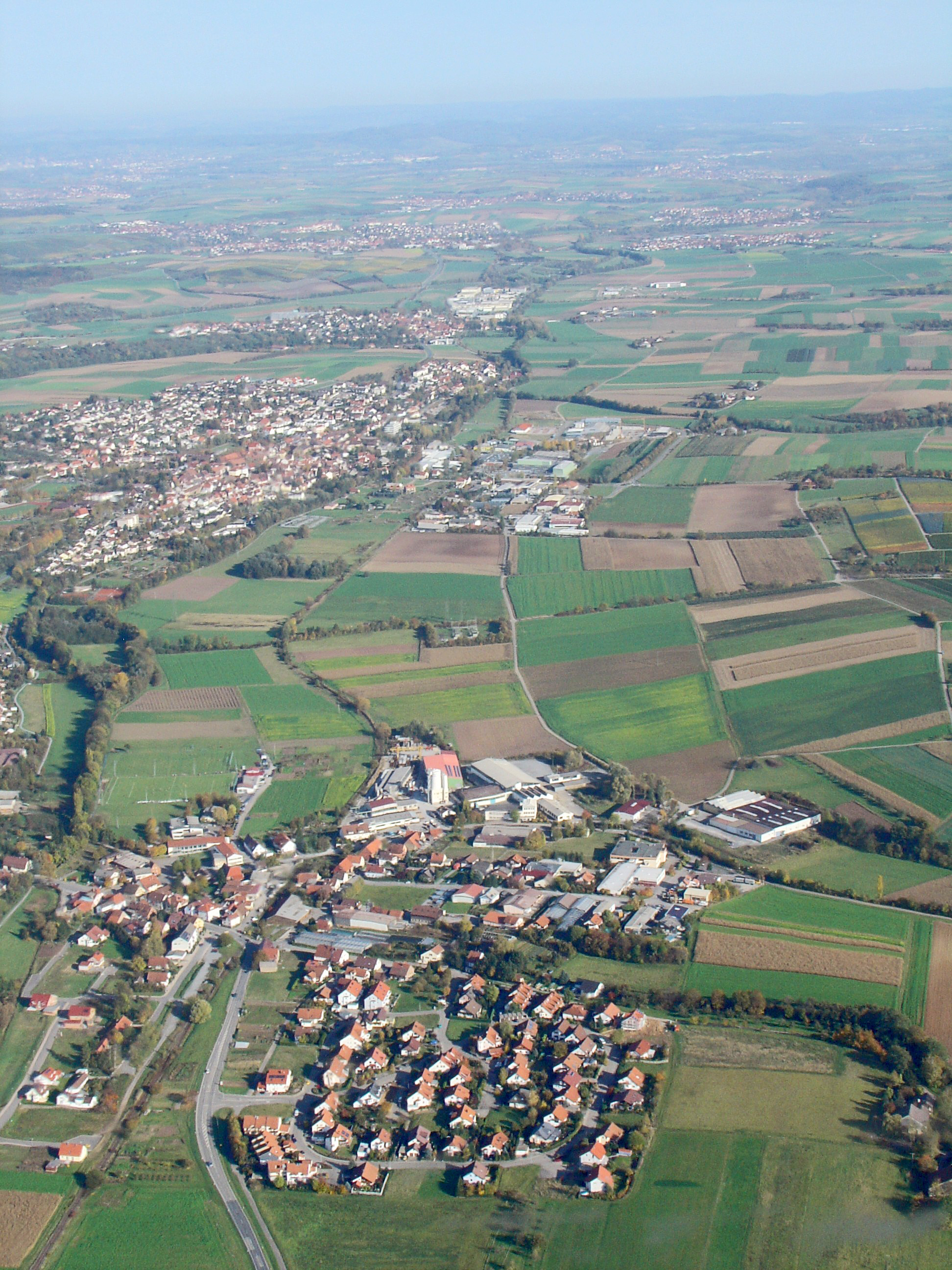 Das Zabergäu - Im Vordergrund Pfaffenhofen; dahinter Güglingen, Frauenzimmern und Brackenheim. Unten links kommen die Gleise der Zabergäubahn ins Bild.